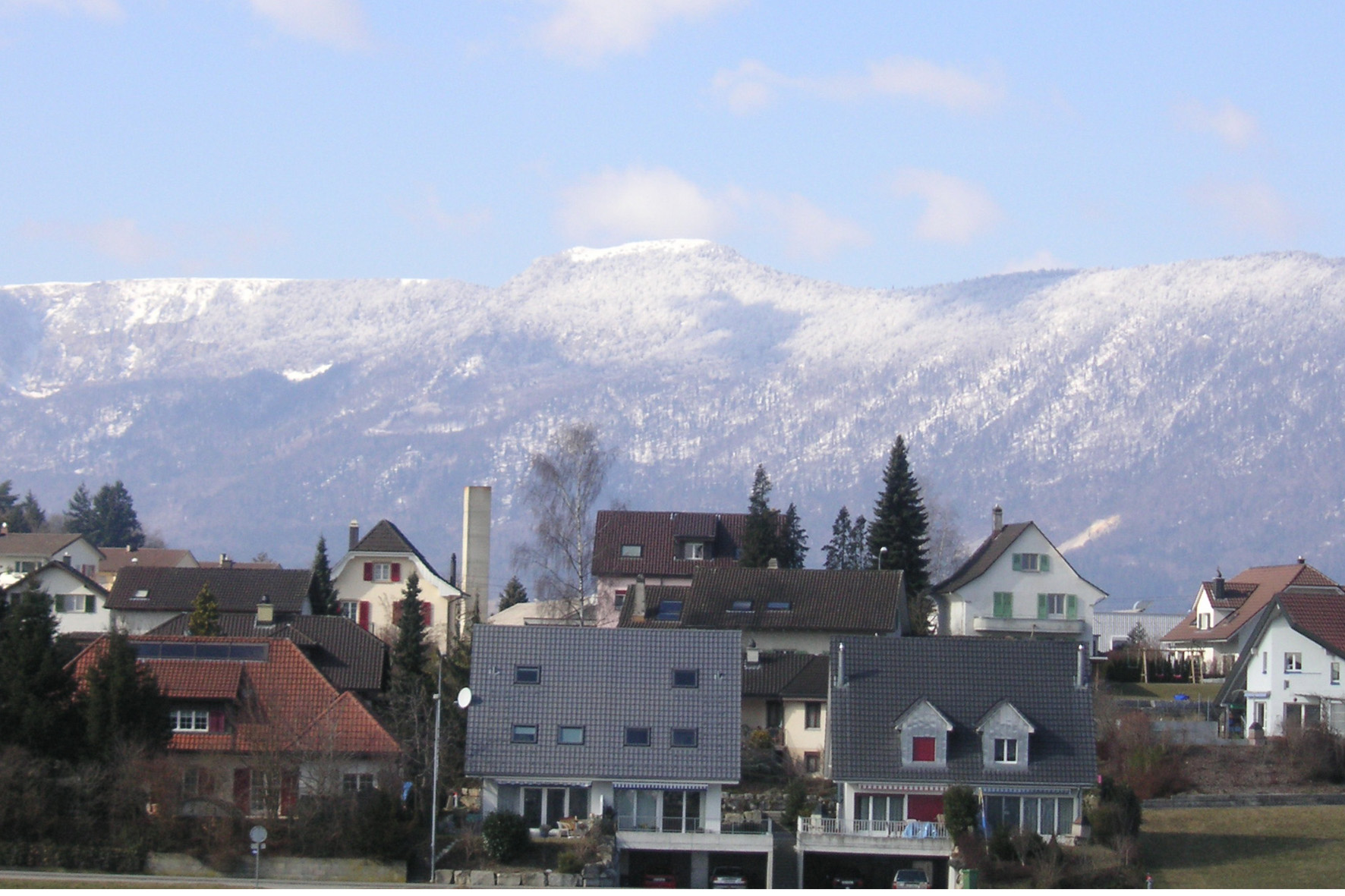 Biberist Quartier Stapfacker Richtung Solothurn/Hasenmatt